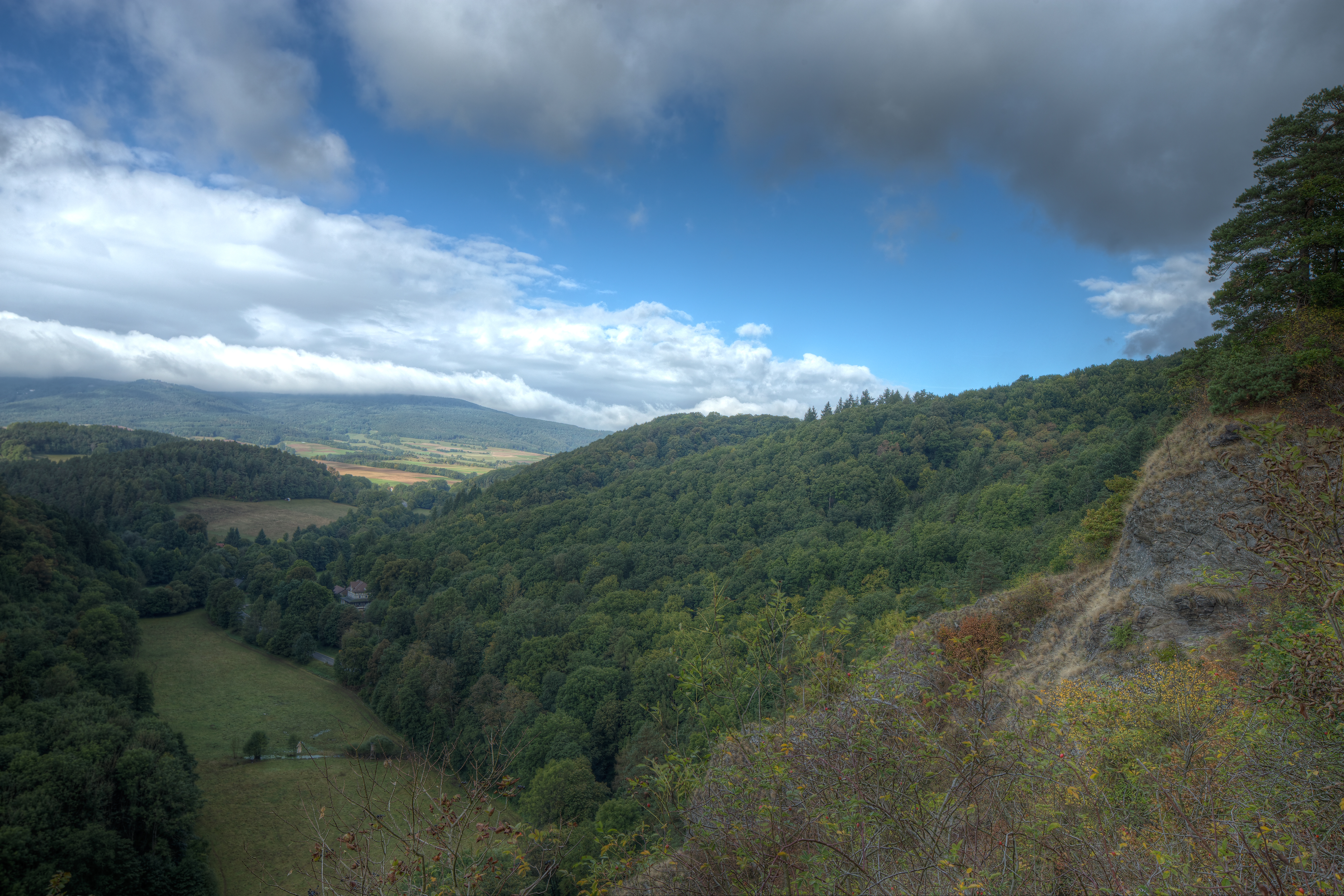 Blick vom Aussichtspunkt der Burg Bilstein im Höllental. Im unteren linken Teil des Bildes sind die Landstraße L3242 sowie der Waldgasthof Frau Holle zu erkennen.